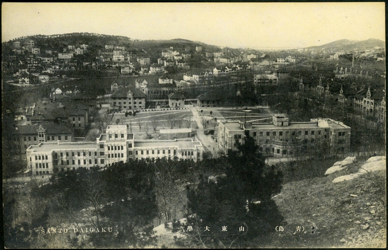 青岛国立山东大学校舍全景